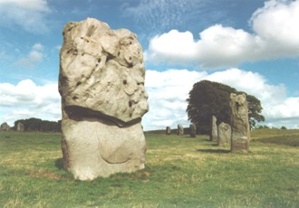 Avebury, 30 km noordelijk van Stonehenge. Foto van Ezel, 1993